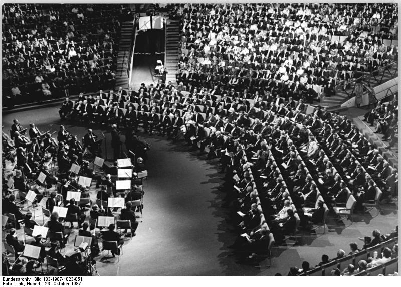 ADN-ZB Link 23.10.87 Berlin: Jubiläum-Festakt. Mit einem Staatsakt der Deutschen Demokratischen Republik im Palast der Republik fanden die Feierlichkeiten zum 750jährigen Jubiläum Berlins ihren Höhepunkt. Zum krönenden Abschluß erklang Ludwig van Beethovens 9. Sinfonie intoniert vom Berliner Sinfonie-Orchester unter der Leitung von Prof. Kurt Sanderling.